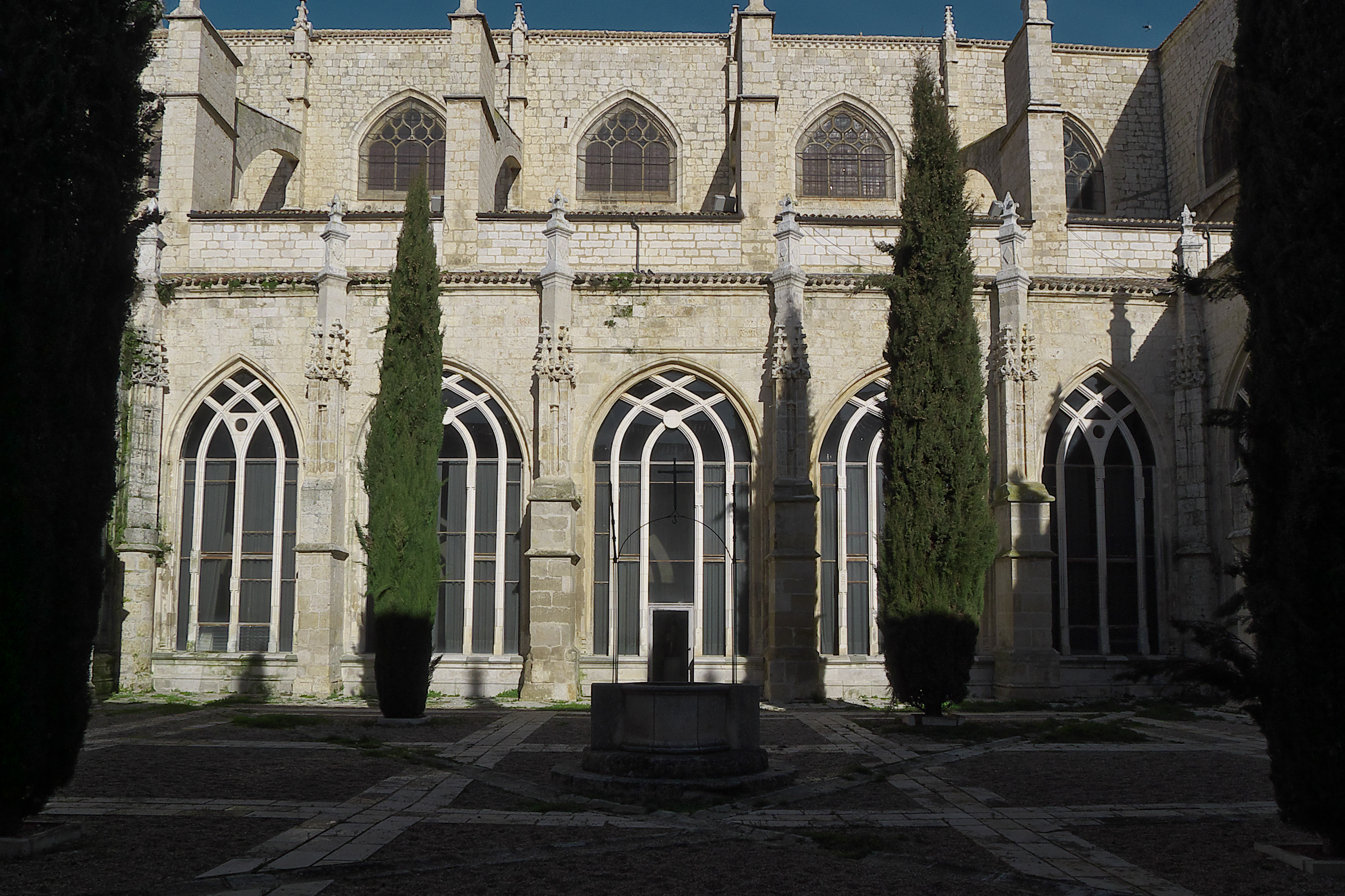 Juan Gil de Hontañón lo termina en 1516. Lamentablemente, ha perdido elementos originales.